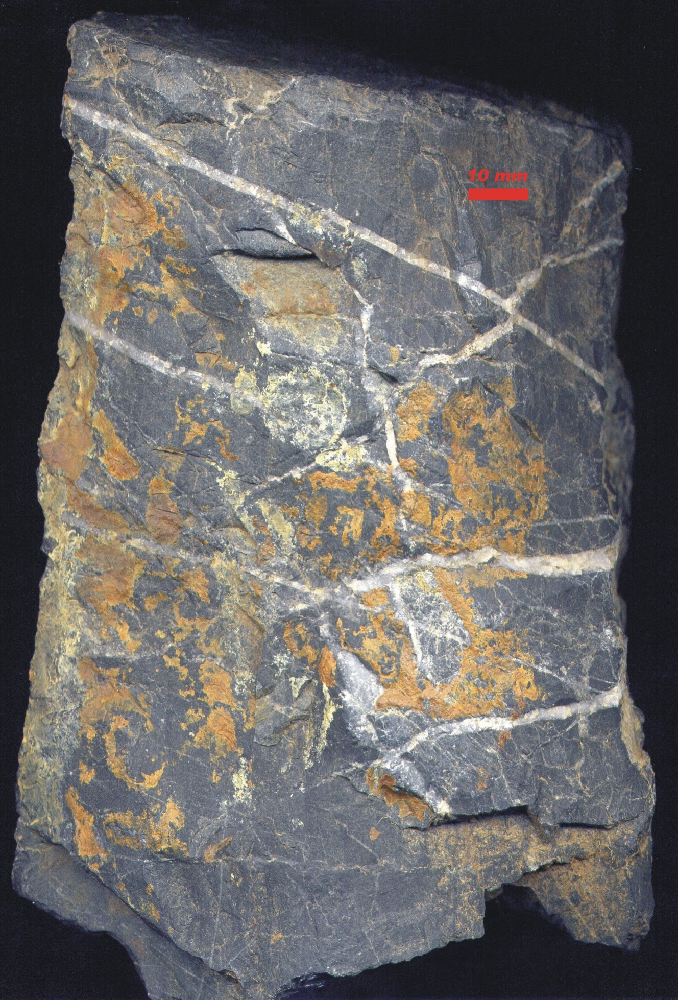 Lydit (Kieselschiefer aus dem Silur) aus dem Ketzerbachtal (Deutschland, Sachsen)